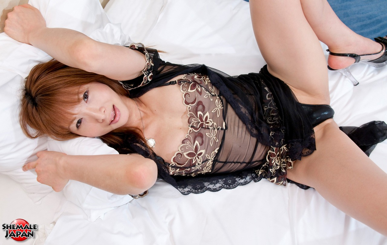 Japanese transsexual porn star Miki Mizuasa